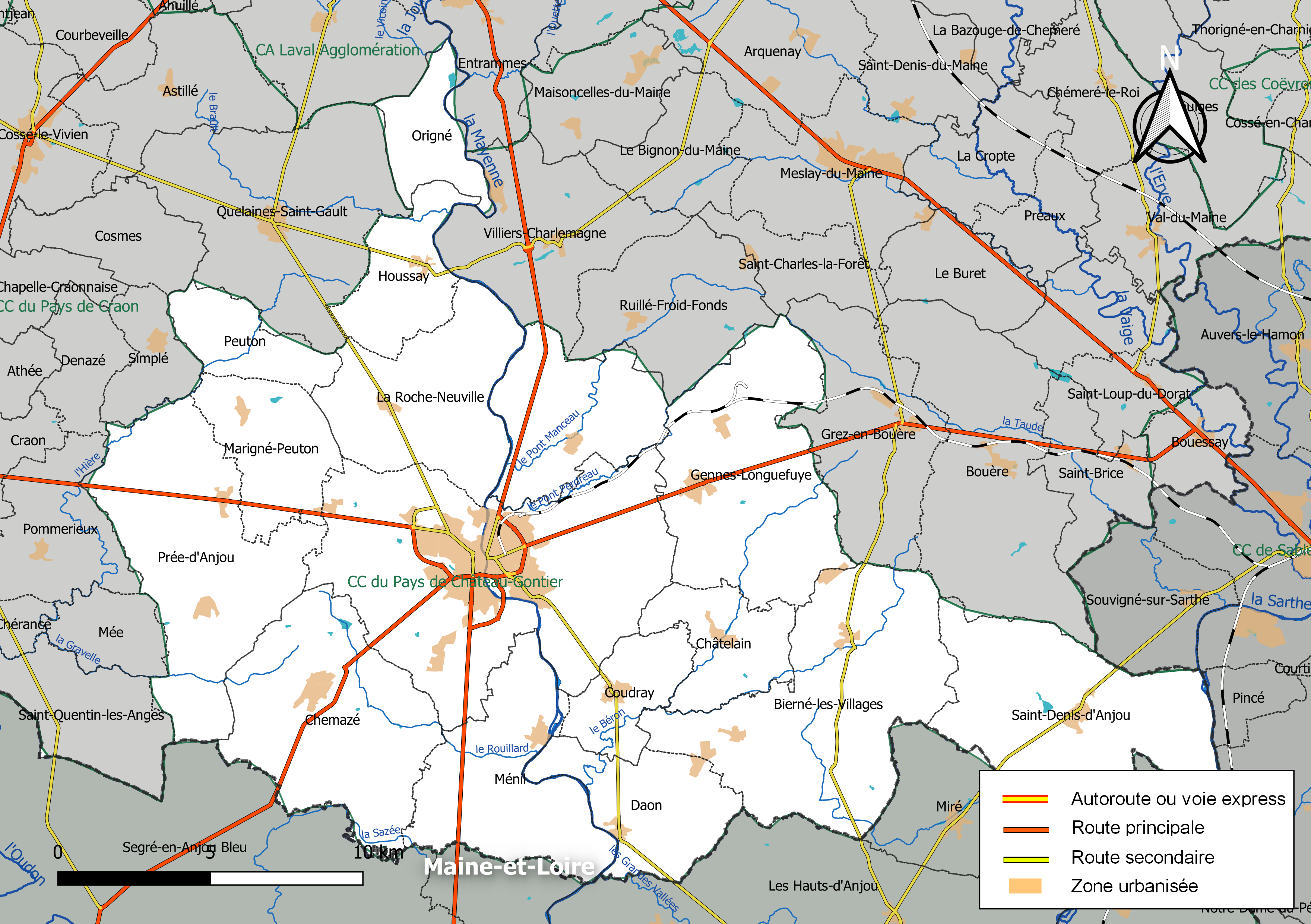 Carte géographique de la Communauté de communes du Pays de Château-Gontier, département de la Mayenne, France. Composition au 1er janvier 2019.